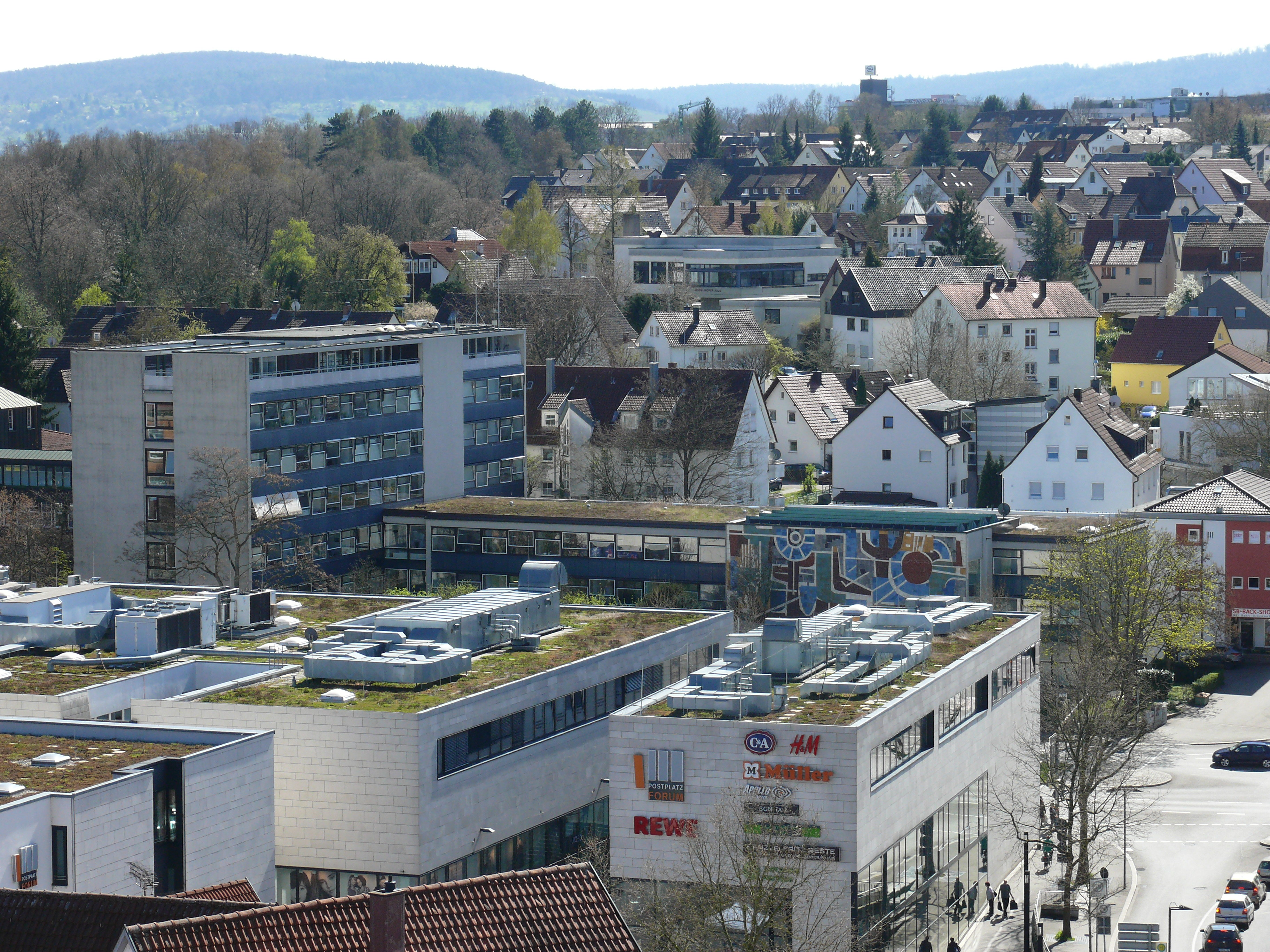 Das Landratsamt in Waiblingen im Rems-Murr-Kreis. Blick vom Hochwachtturm.